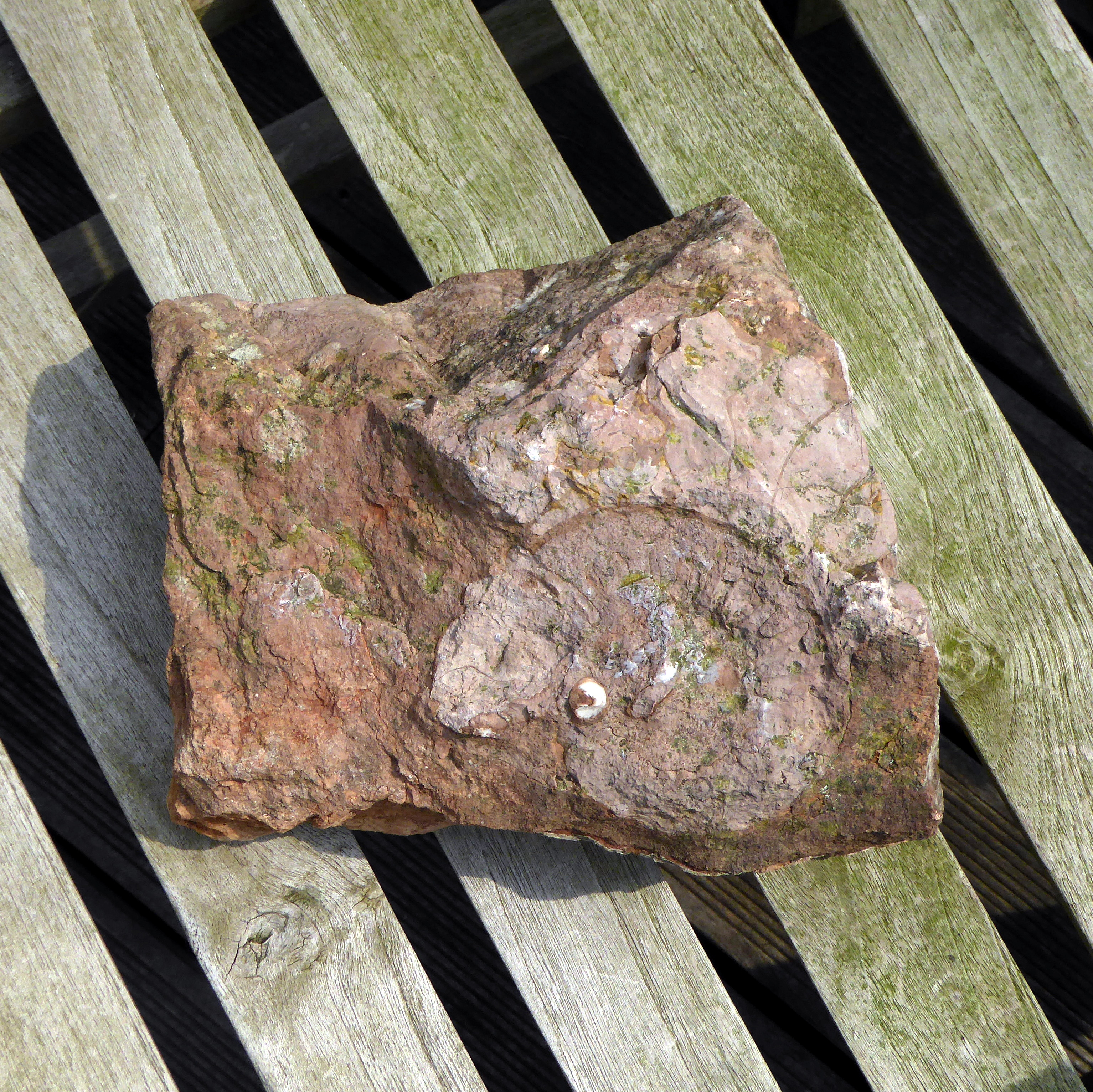 Adenter Marmor mit Versteinerung